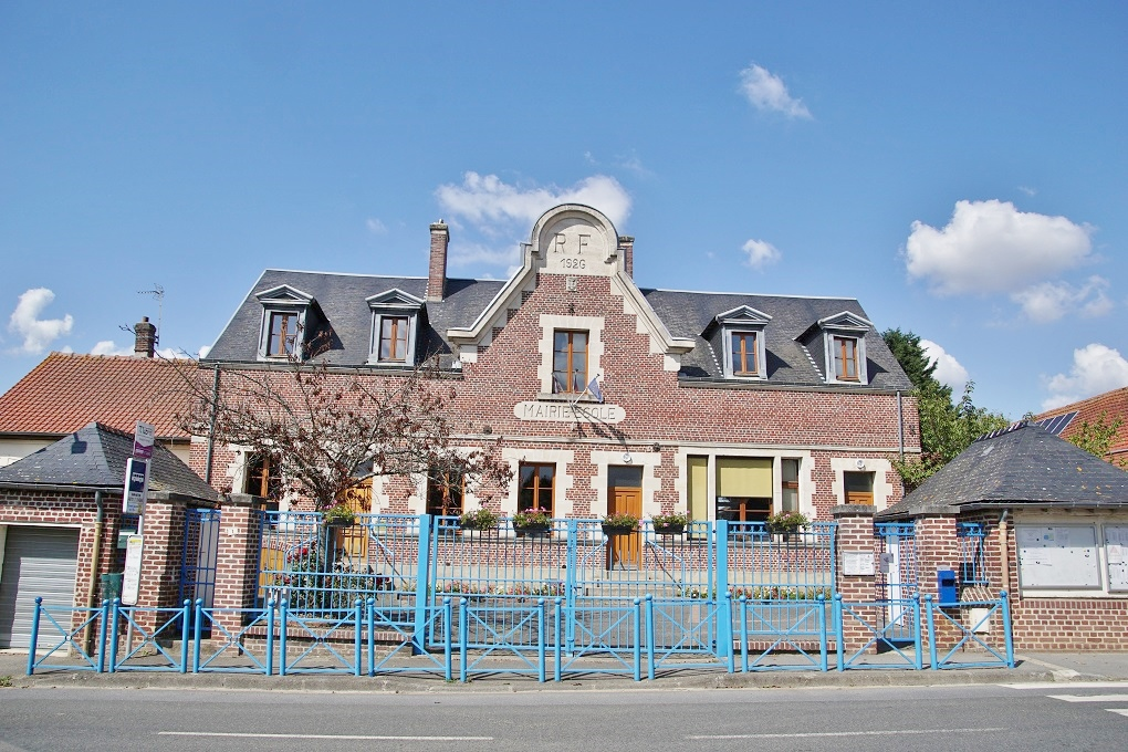 la Marie